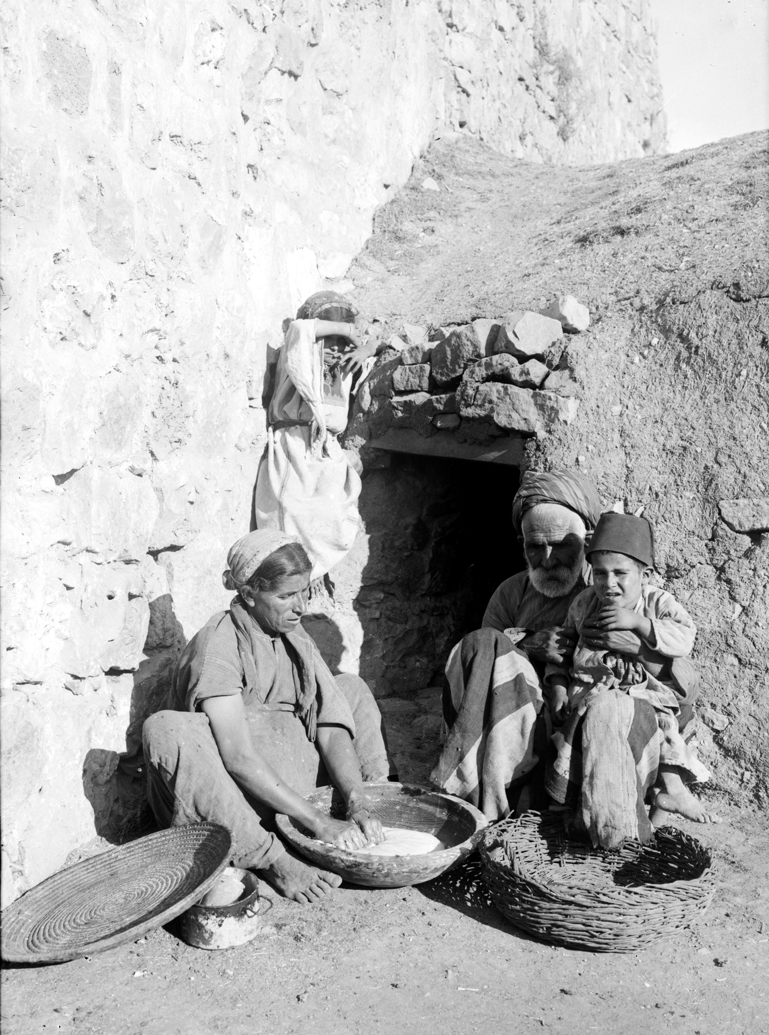 Costumes, characters, etc. Village oven.